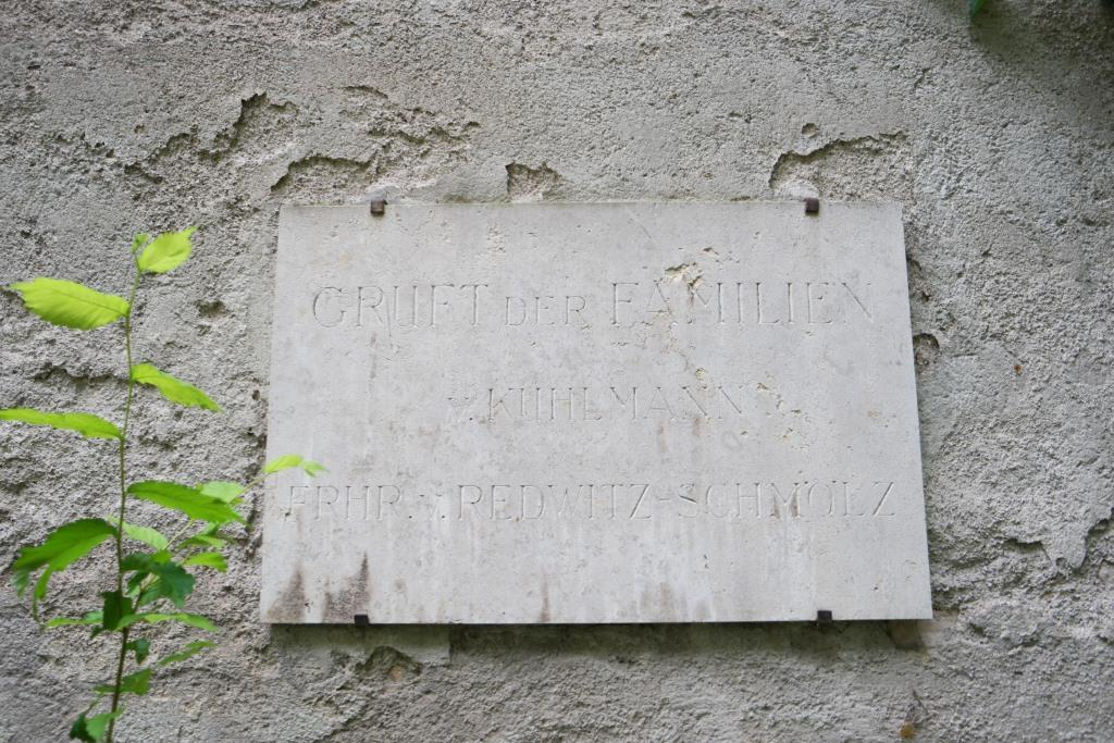 Grab Otto von Kühlmanns (1834-1915) auf dem Alten Südlichen Friedhof in München